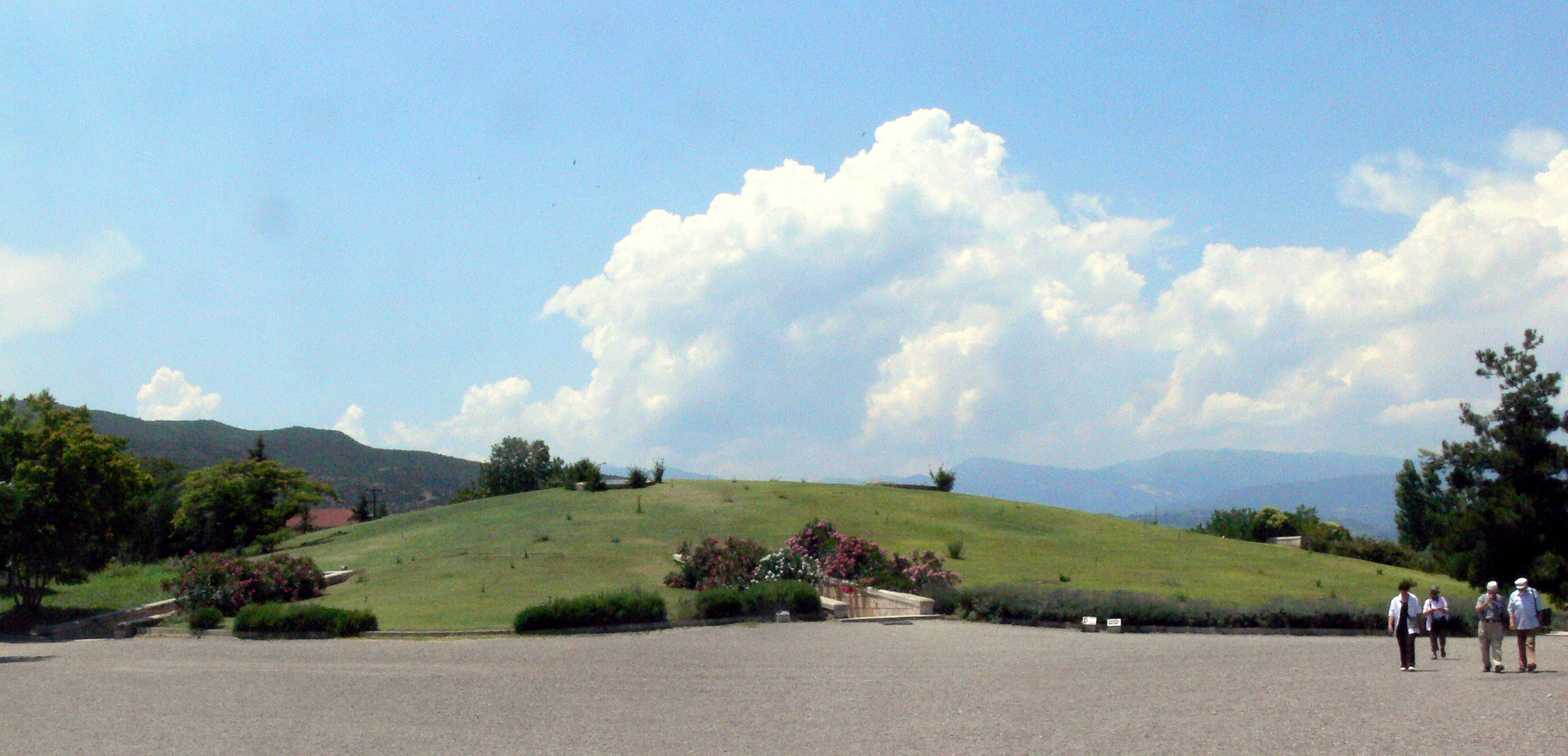 grobowiec Filipa II Macedońskiego